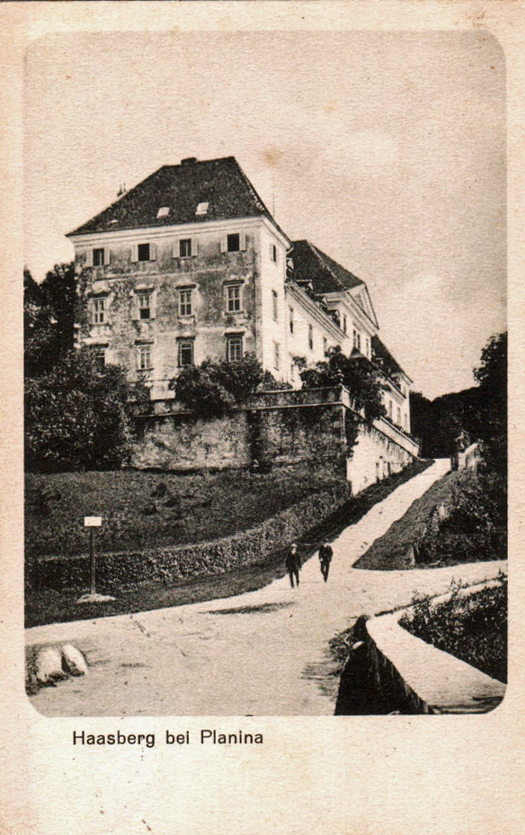 Razglednica dvorca Hošperk.